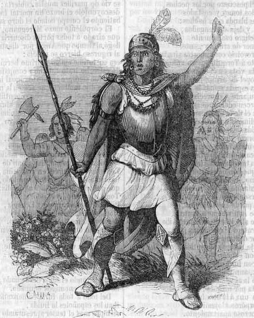 Lautaro al frente de su Ejército, hacia 1550